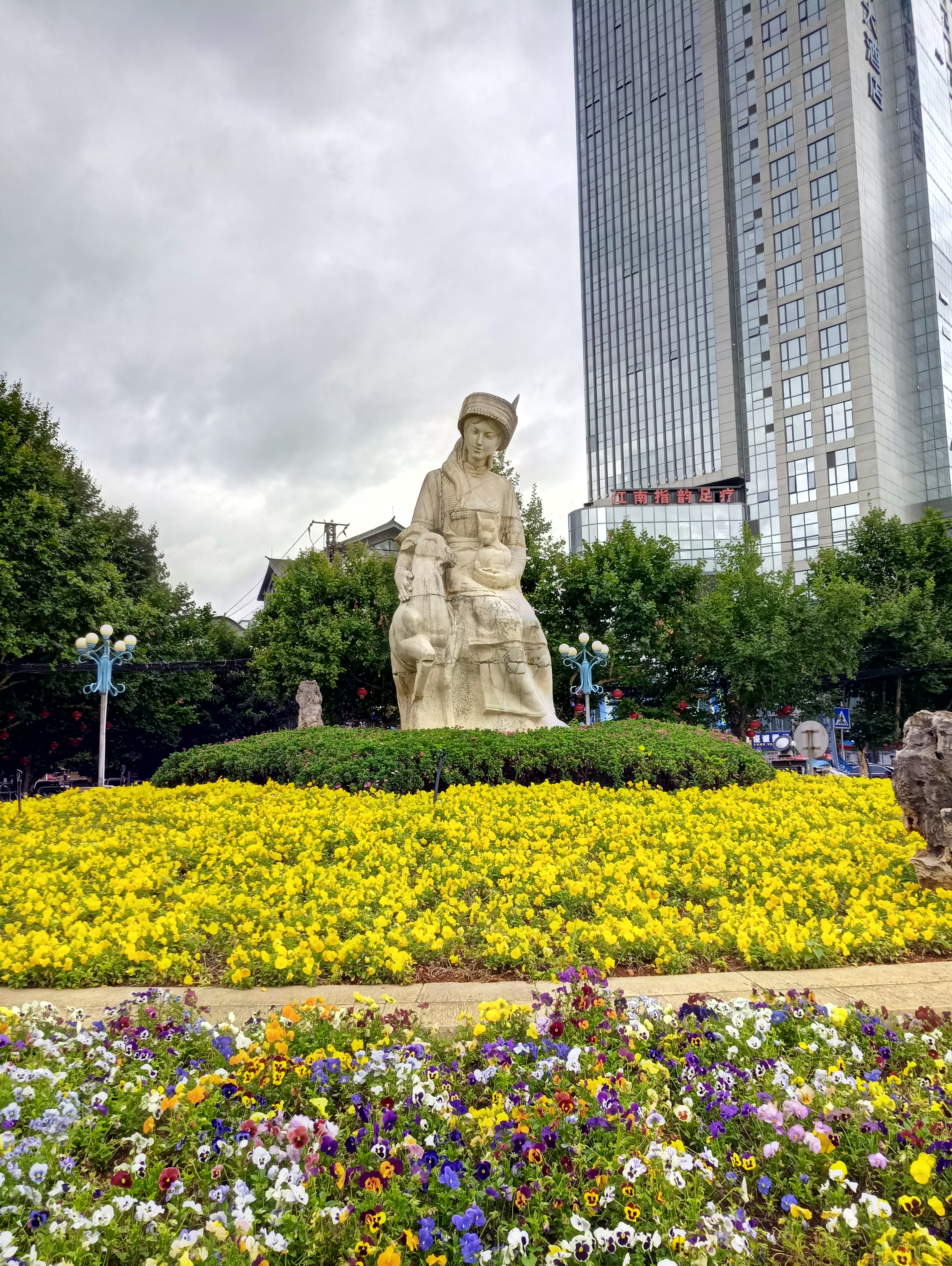 中文（中国大陆）: 石林县阿诗玛转盘雕像